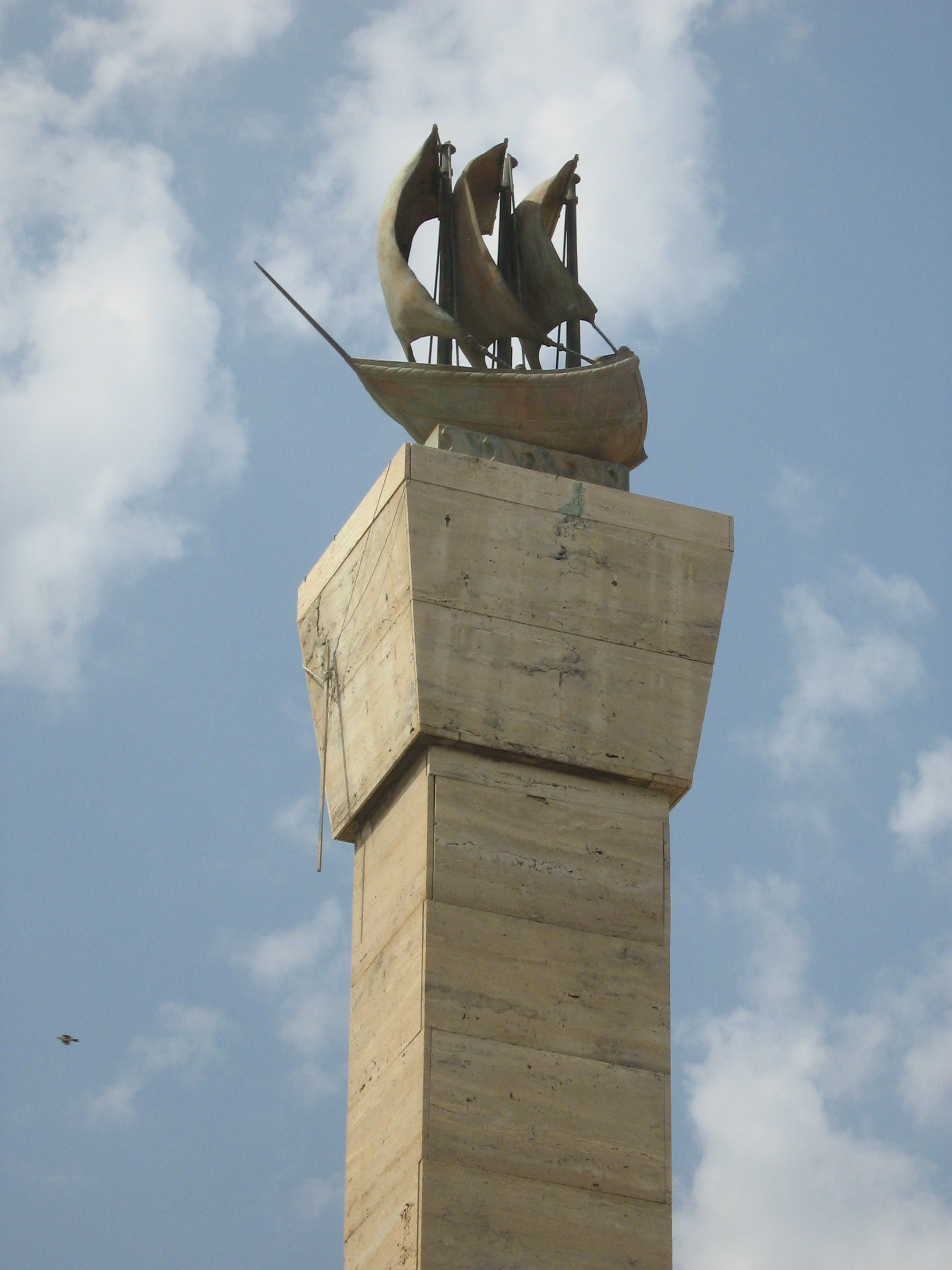 Парусник - символ города Триполи.